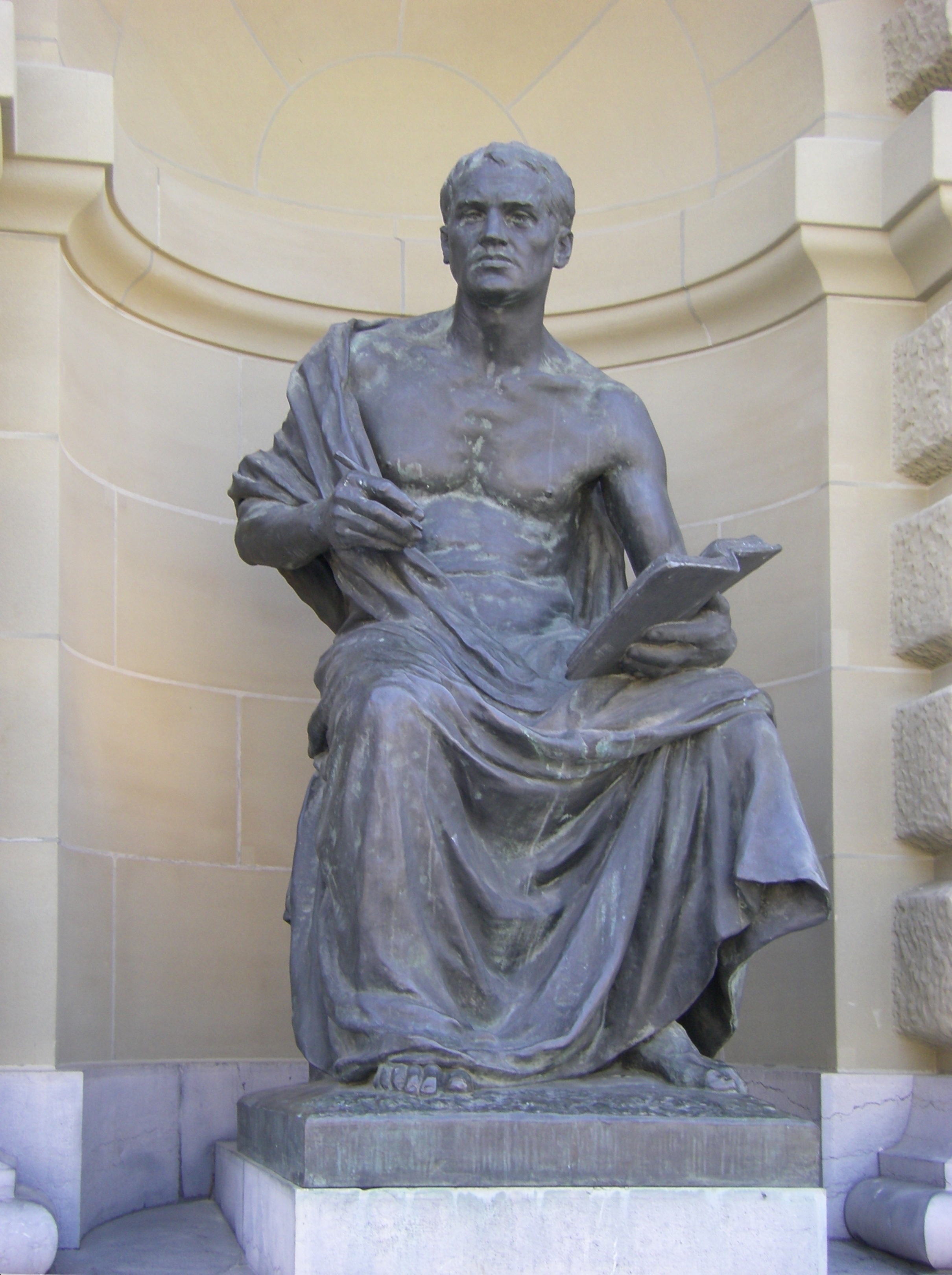 Statue "Geschichtsschreiber der Gegenwart" von Maurice Reymond de Broutelles (1862–1936). Die Statue befindet sich am Bundeshaus in Bern, Schweiz, rechts vom Hauptportal. Sie wurde 1901 erstellt.